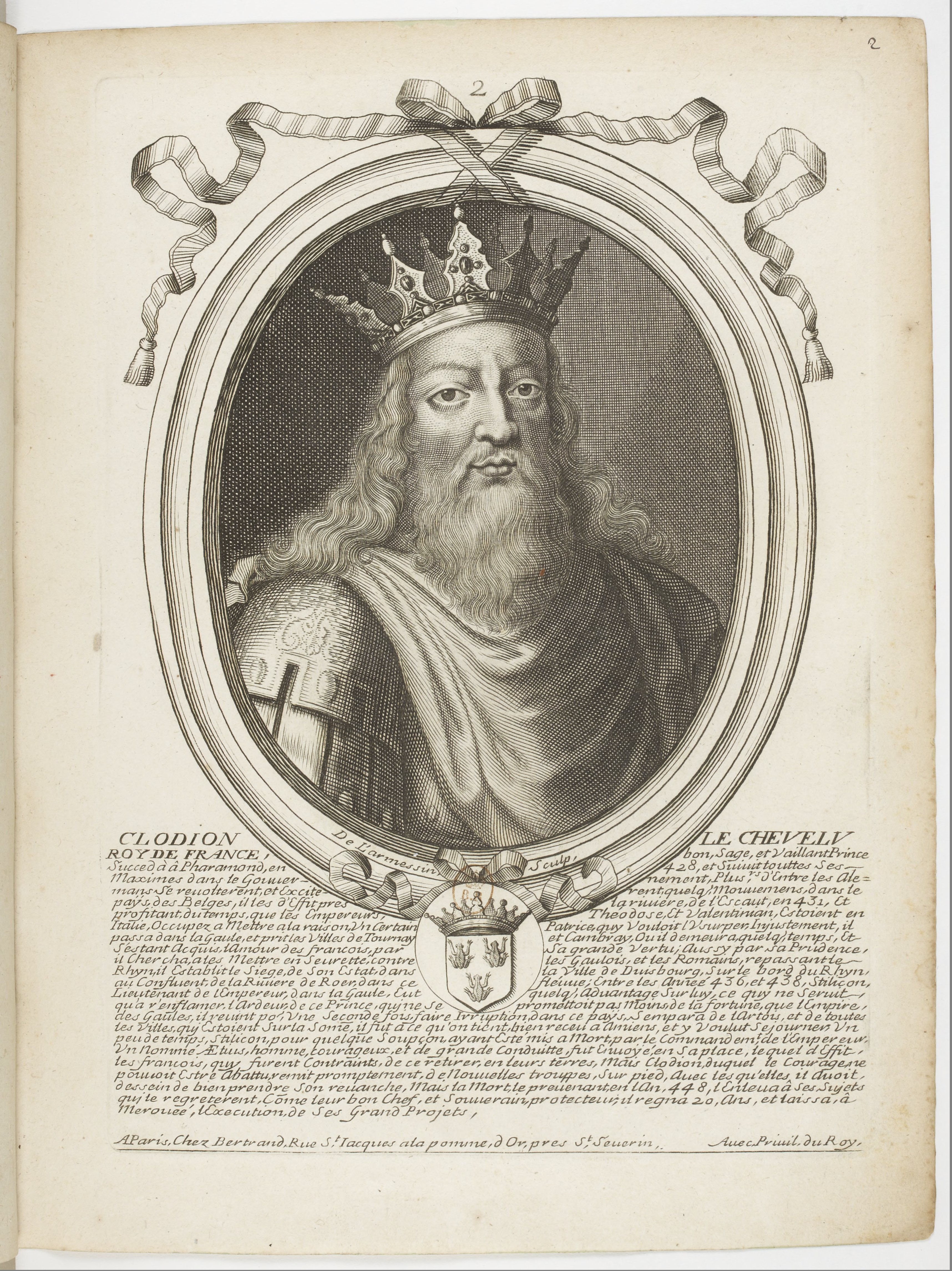 Les augustes représentations de tous les rois de France, depuis Pharamond jusqu'à Louis XIV,... avec un abrégé historique sous chacun, contenant leurs naissances, inclinations et actions plus remarquables pendant leurs règnes